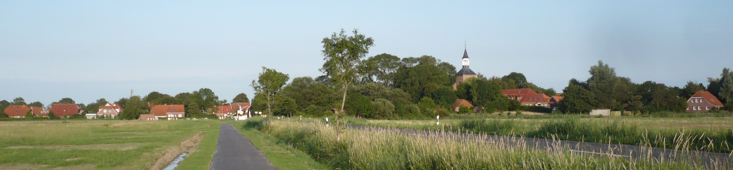 Werdum im Harlingerland, Ansicht von Westen